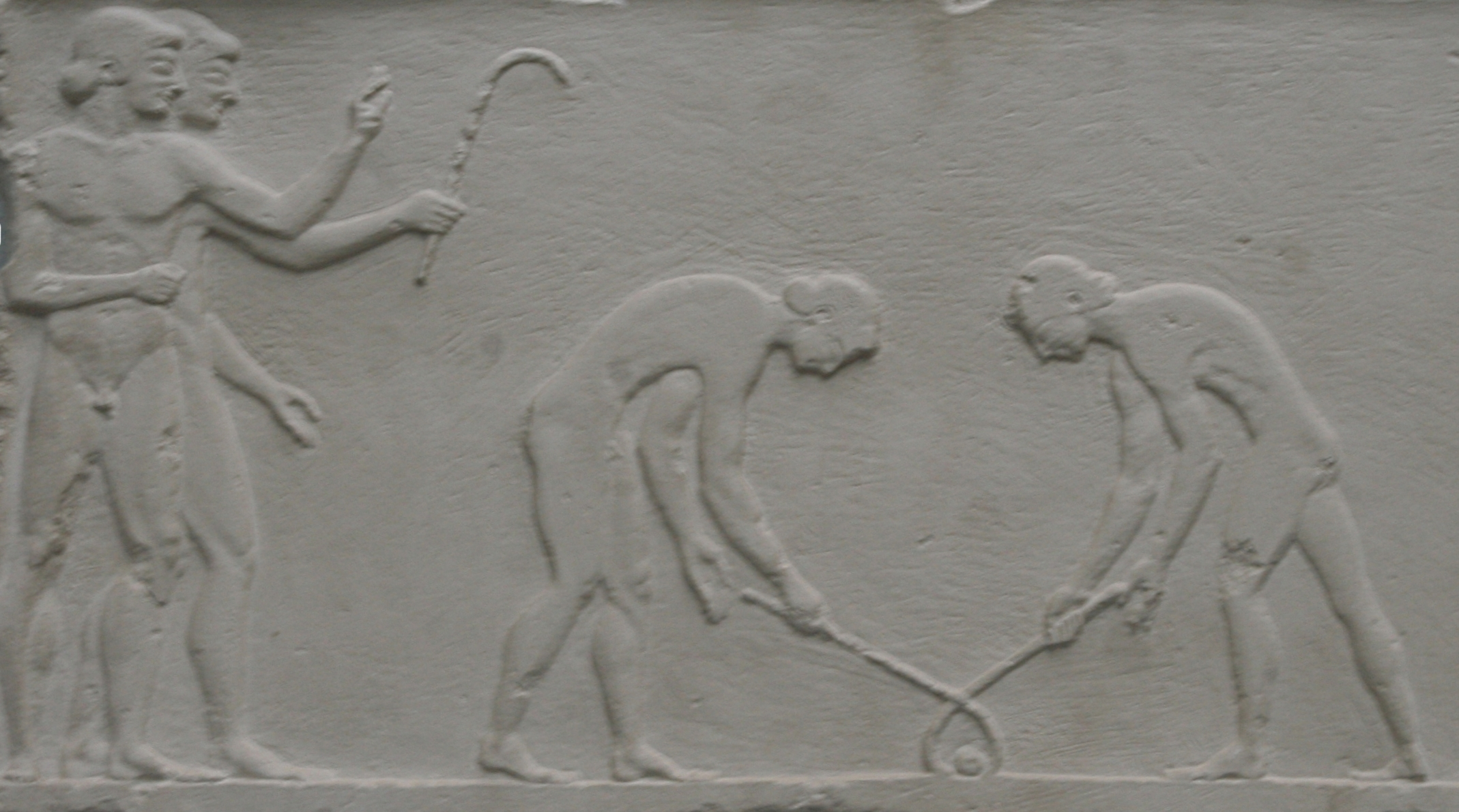 Abguss eines Reliefs eines Ballspiels, dessen Regeln leider nicht überliefert sind. Original Athen, Nationalmuseum. ca. 500 v.Chr. Photographed by me in Glytothek Munich